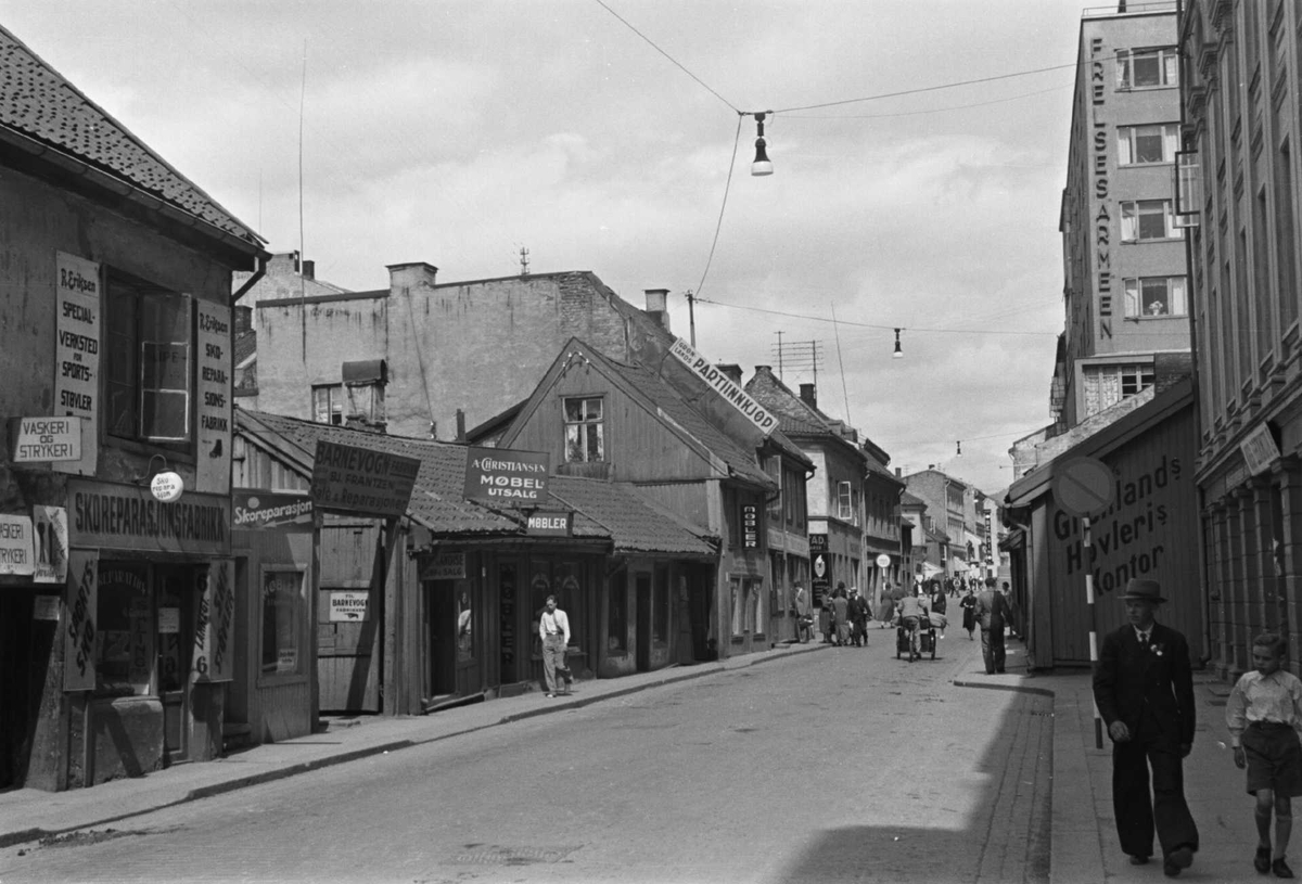 Lakkegata sett fra Grønland mot Breigata, april 1938